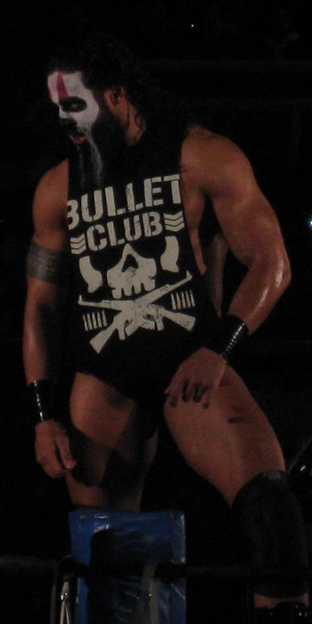 2014年3月23日 ベイコム総合体育館 「NEW JAPAN CUP Final」 タマ・トンガ